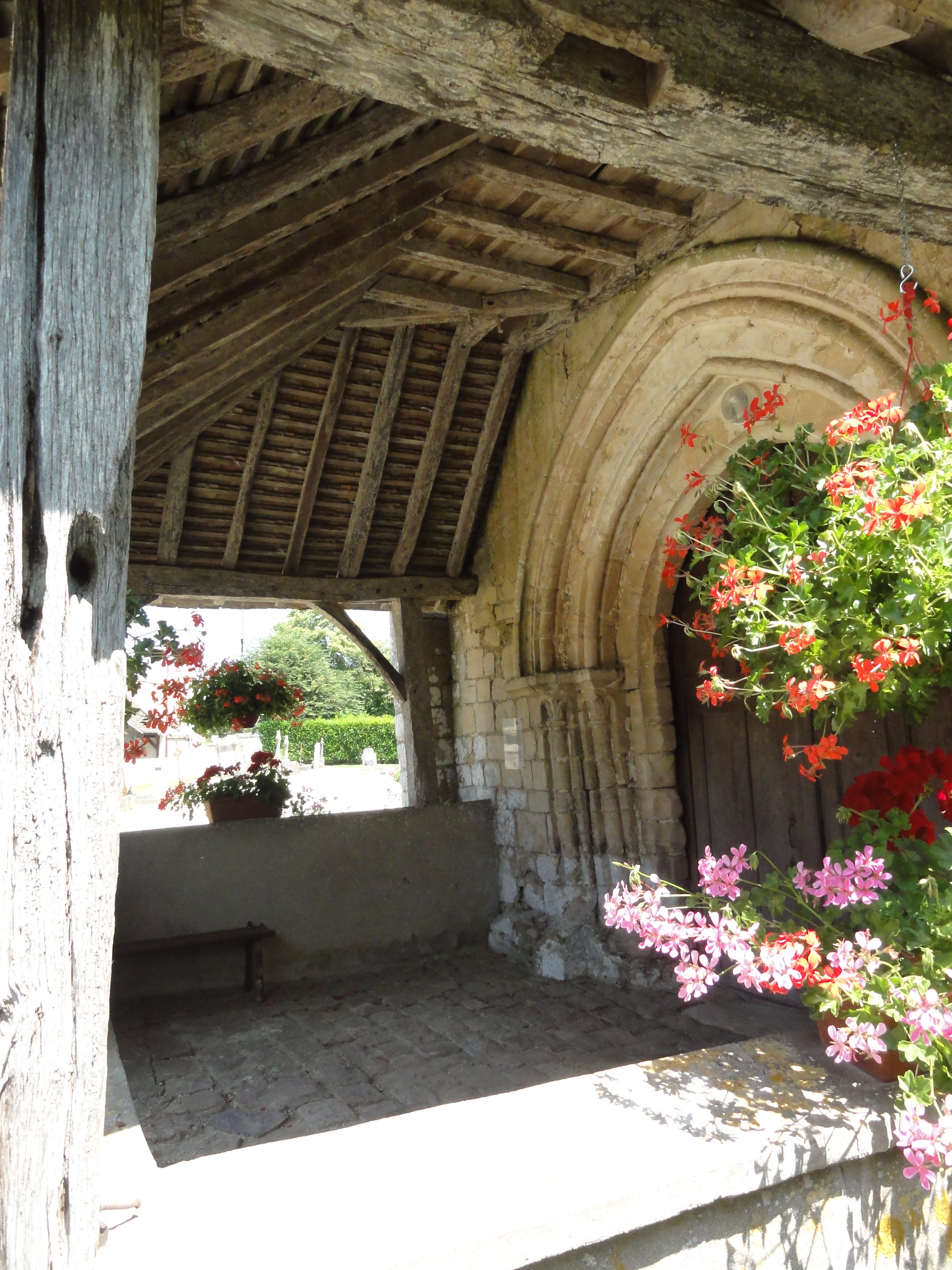 Peray (Sarthe) église, porche